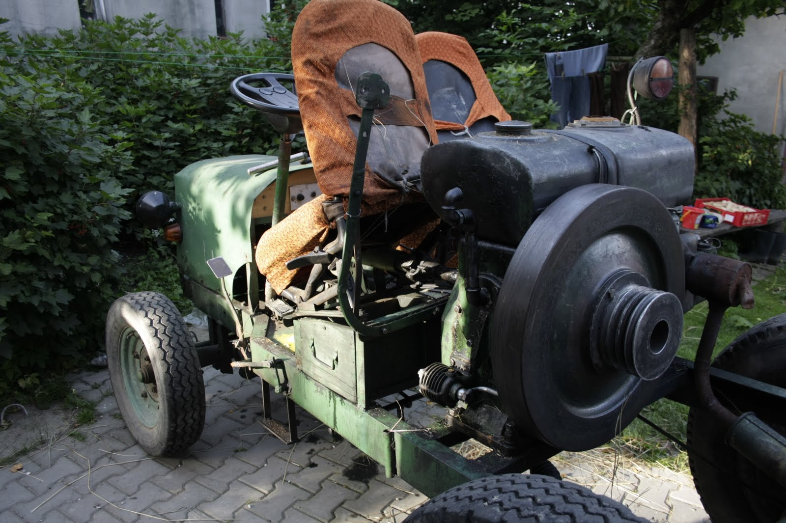 Silnik S-320 WSW Andoria zabudowany na ciągniku rolniczym typu SAM (esiok). Napęd przekazywany wałem na reduktor a następnie na skrzynie biegów z pojazdów Lublin 51 oraz Żuk.